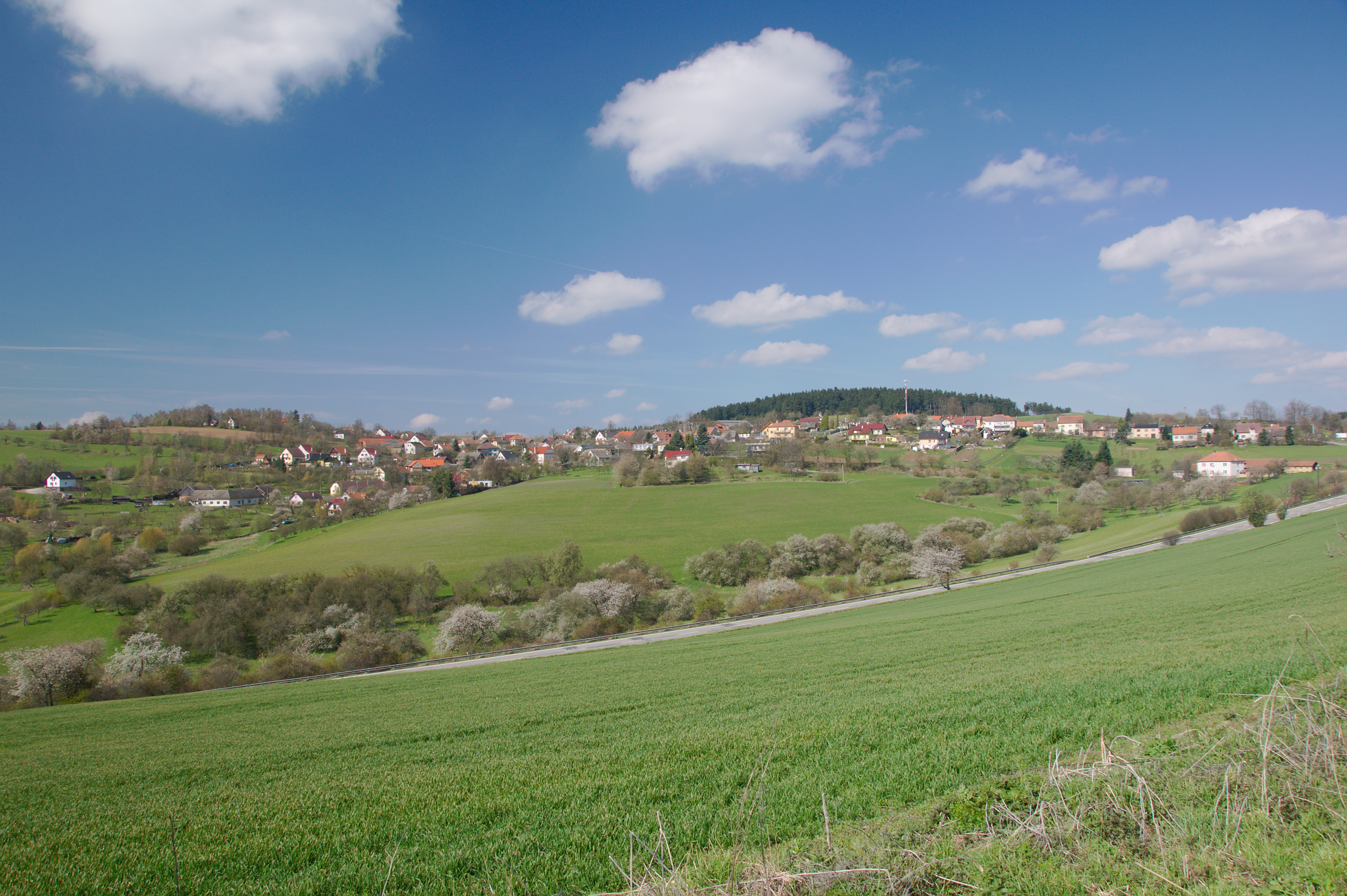 Pohled na obec od východu, Rozseč nad Kunštátem, okres Blansko